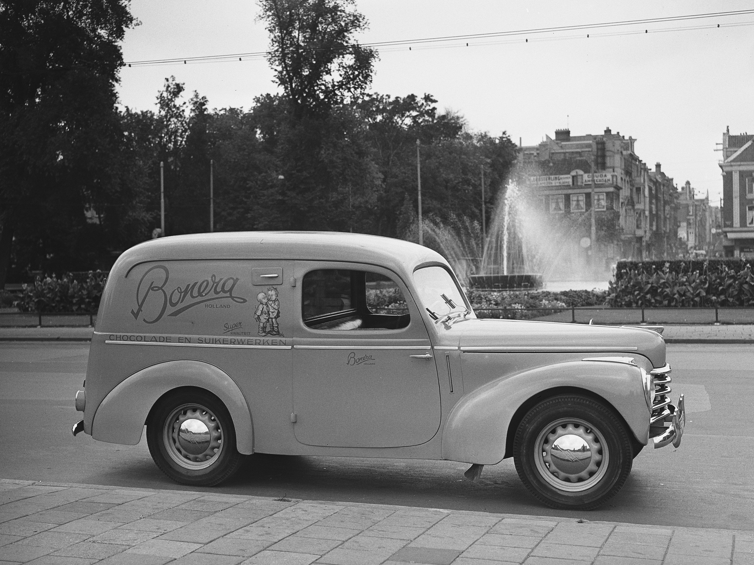 Collectie / Archief : Fotocollectie Anefo Reportage / Serie : [ onbekend ] Beschrijving : Reizigerauto "Bonera" Datum : 23 september 1952 Trefwoorden : auto's Fotograaf : Bilsen, Joop van / Anefo Auteursrechthebbende : Nationaal Archief Materiaalsoort : Glasnegatief Nummer archiefinventaris : bekijk toegang 2.24.01.09 Bestanddeelnummer : 905-3239